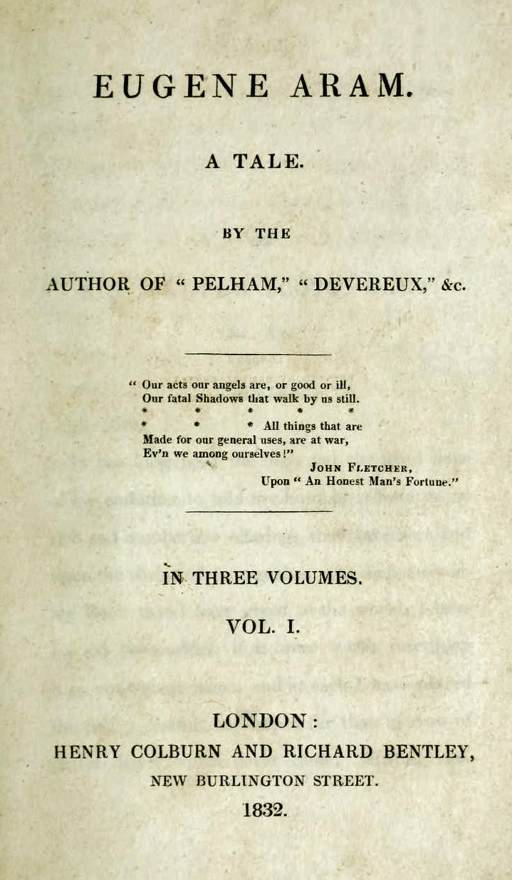 Eugene Aram 1st ed title pg